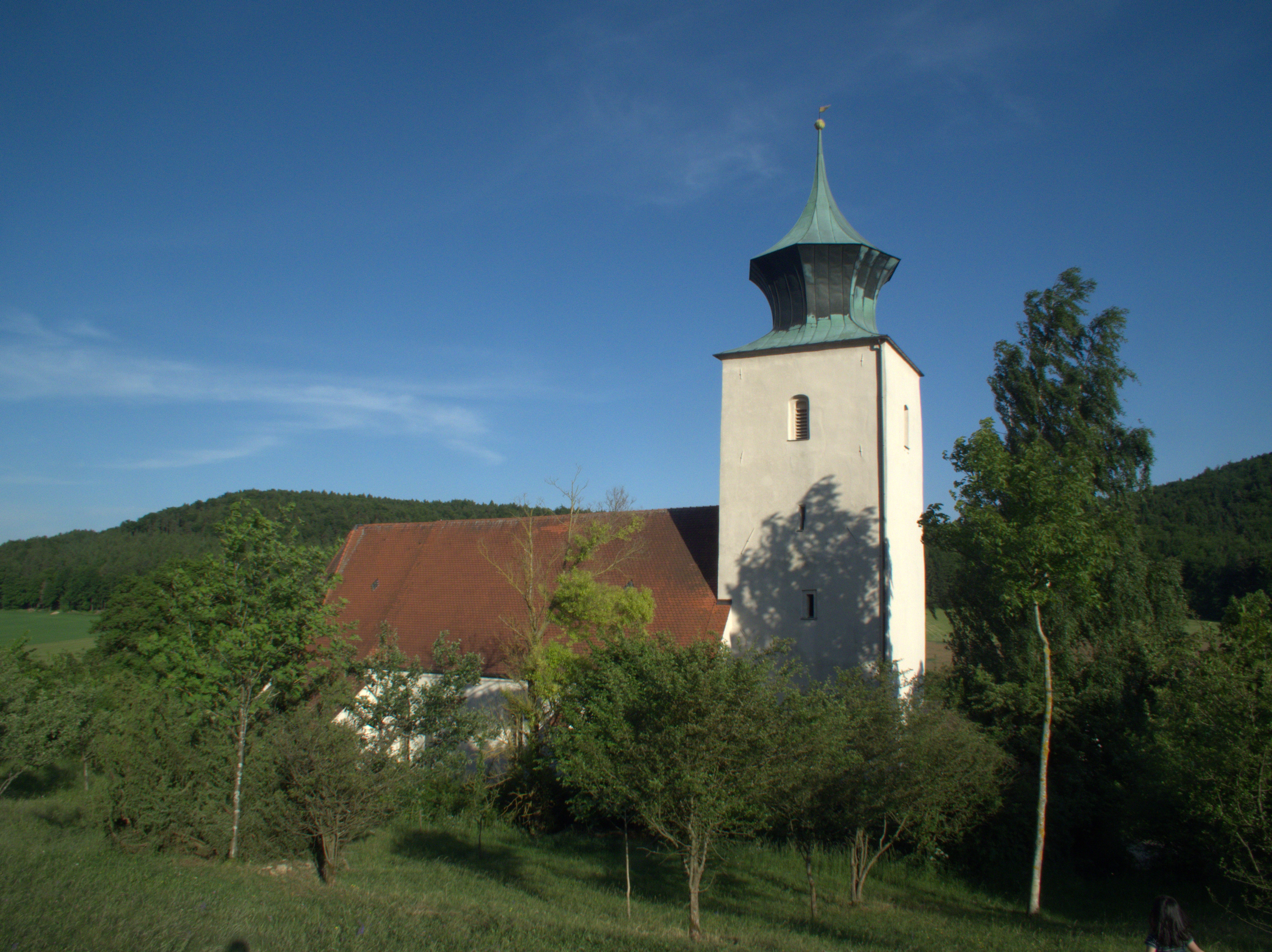 Wallfahrtskirche St. Wolfgang bei Velburg, Oberpfalz: Kirche von aussen